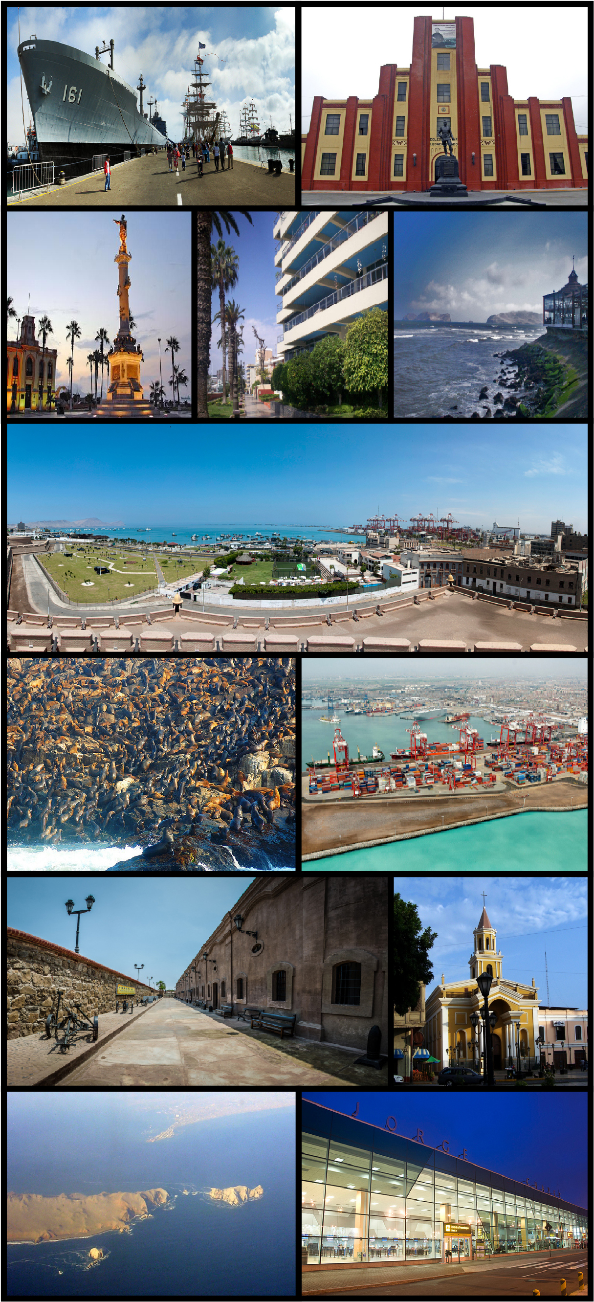 ciudad del callao y sus principales atractivos